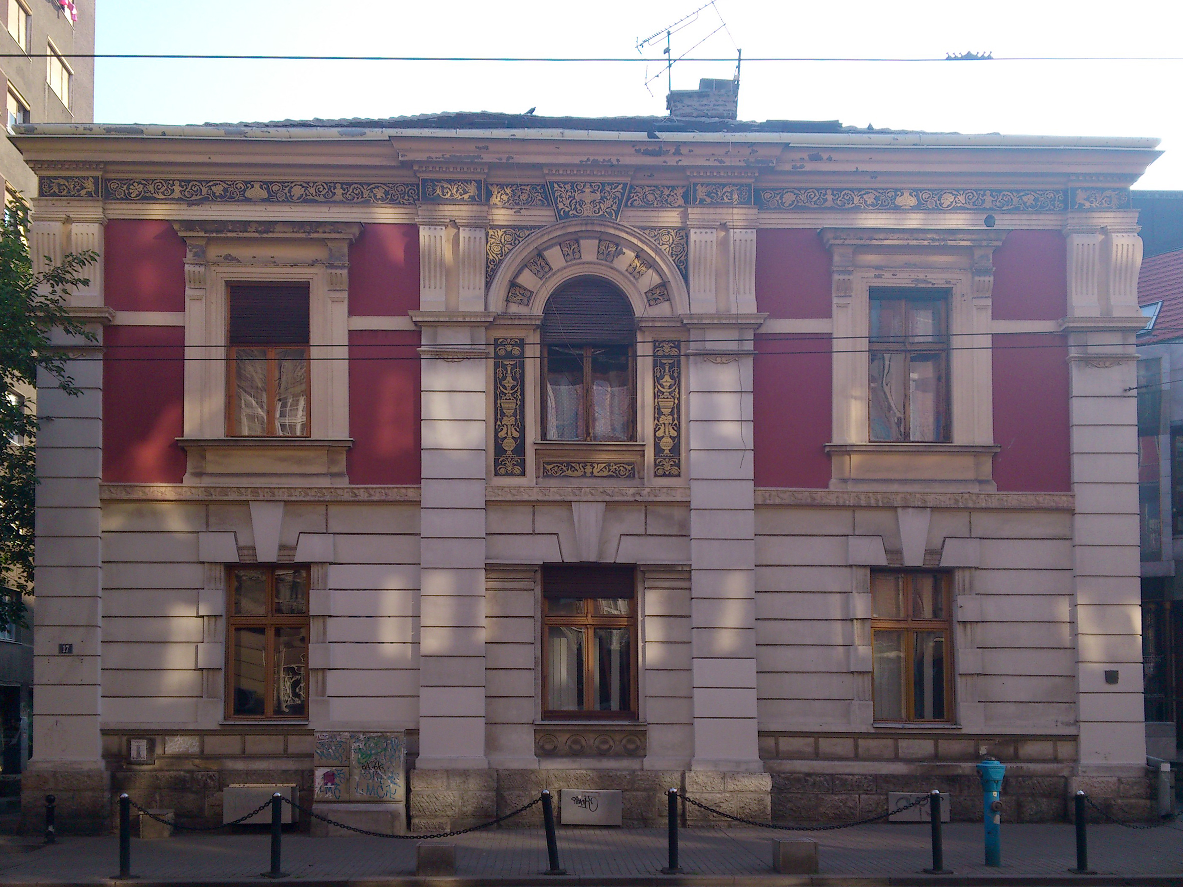 Beograd Kuća Jevrema Grujića Svetogorska 17